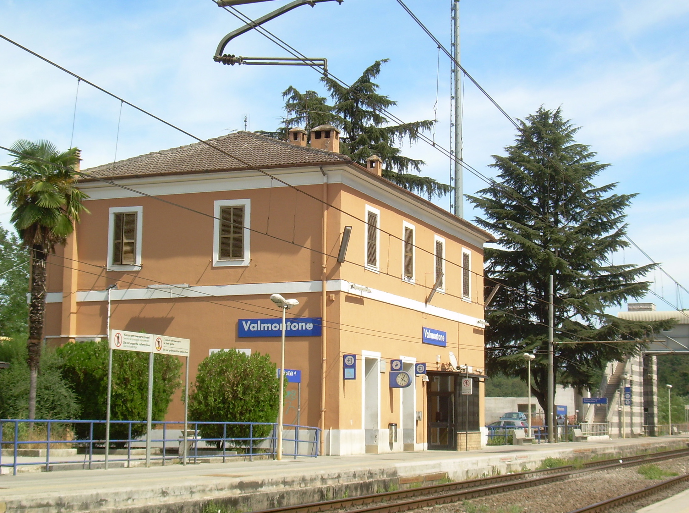 Andrea Saracini - foto della stazione FS di Valmontone